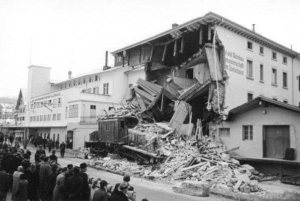 Am 22. Februar 1948 wurde ein ausser Kontrolle geratener Sportzug im Bahnhof Wädenswil auf das Industriegeleis der Obst- und Weinbaugenossenschaft geleitet, wo er entgleiste. Vier Tage später wurde die Lokomotive Ce 6/8 II 14269 aus den Trümmern des eingestürzten Gebäudes geborgen und abtransportiert.